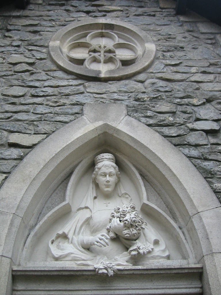 Reliefbüste Kaiserin Elisabeths von Österreich am Portal der Elisbeths-Kapelle in Rosenburg am Kamp.